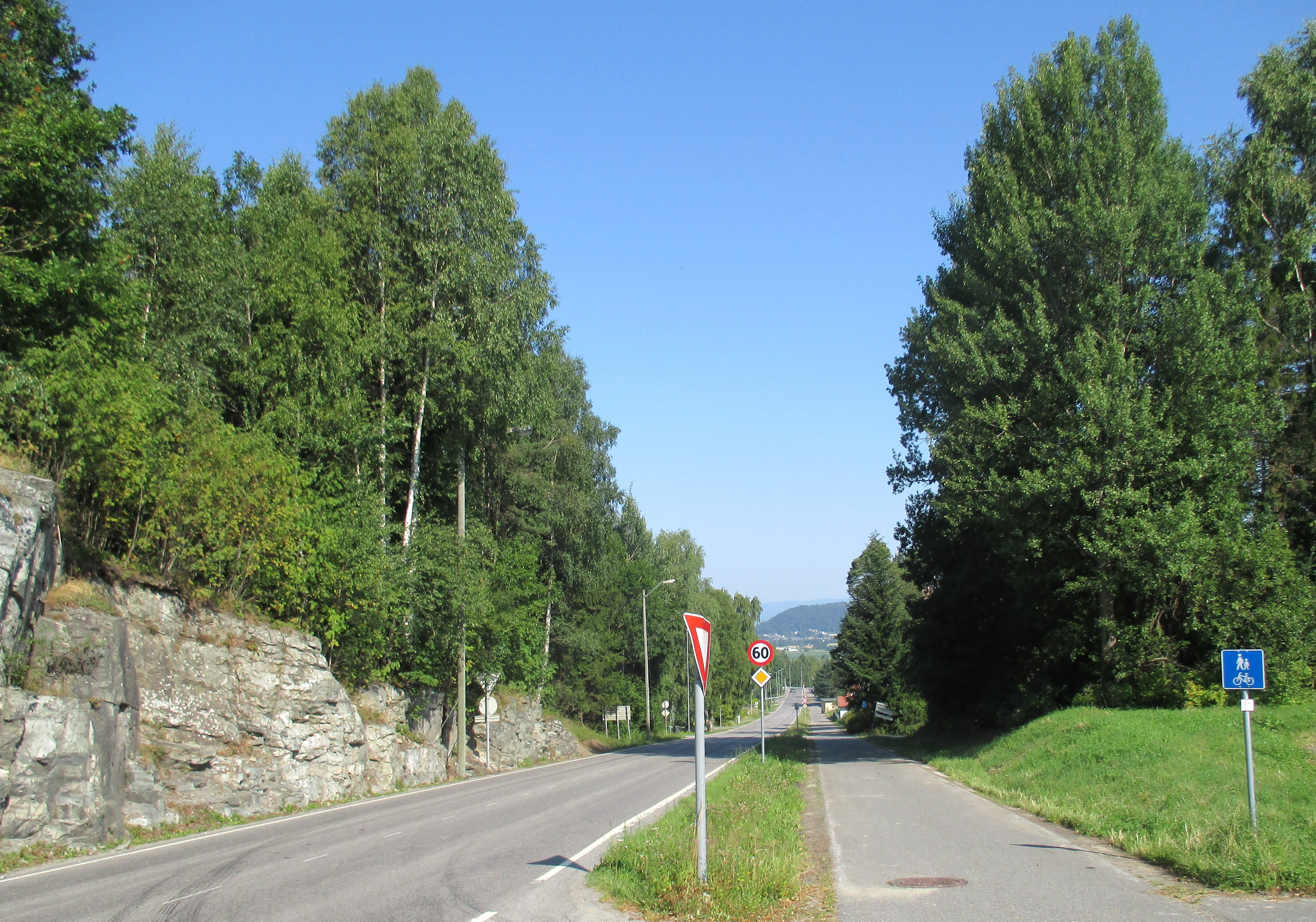 Fylkesvei 2 like ved Eidanger kirke